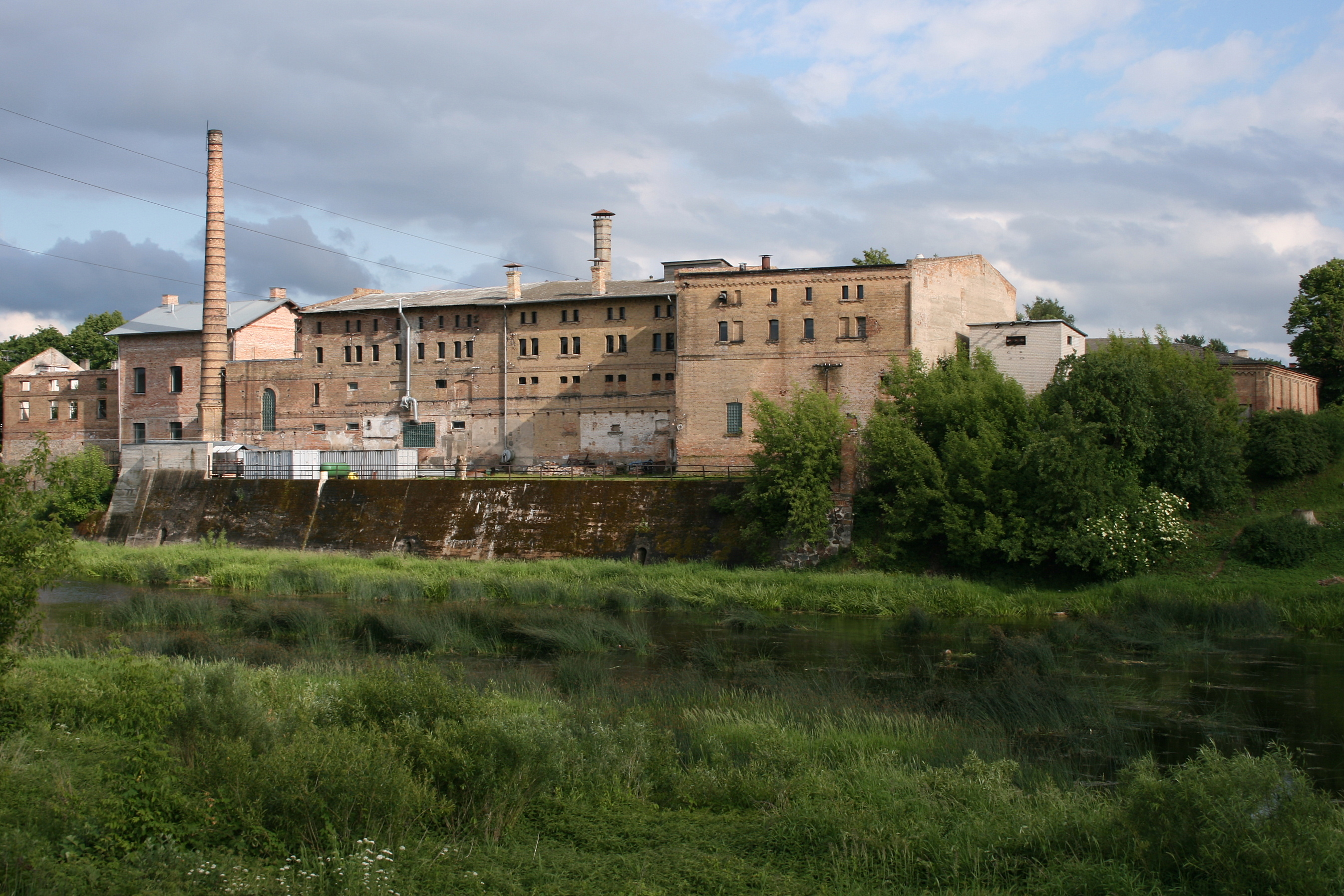 Lodinga alus darītava (1873.)